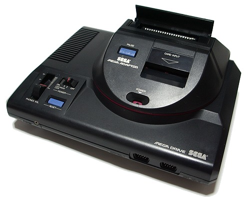 メガアダプタとメガドライブを接続した様子。 投稿者撮影。 Category:ゲーム機画像 Category:メガドライブ